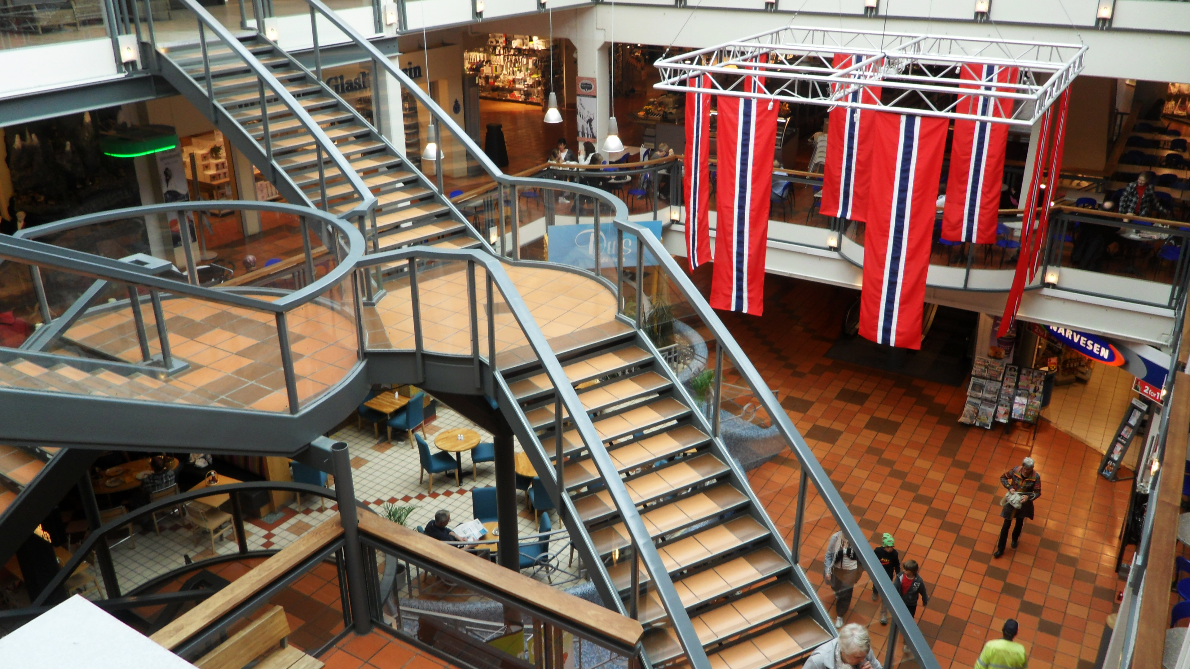 Strømmen Storsenter